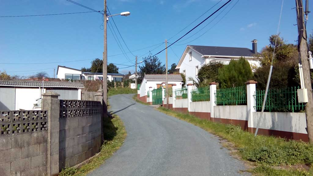 Vista da Verruga, Narón.